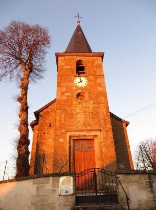 Badonvilliers Gerauvilliers eglise Saint-Martin de Gerauvilliers